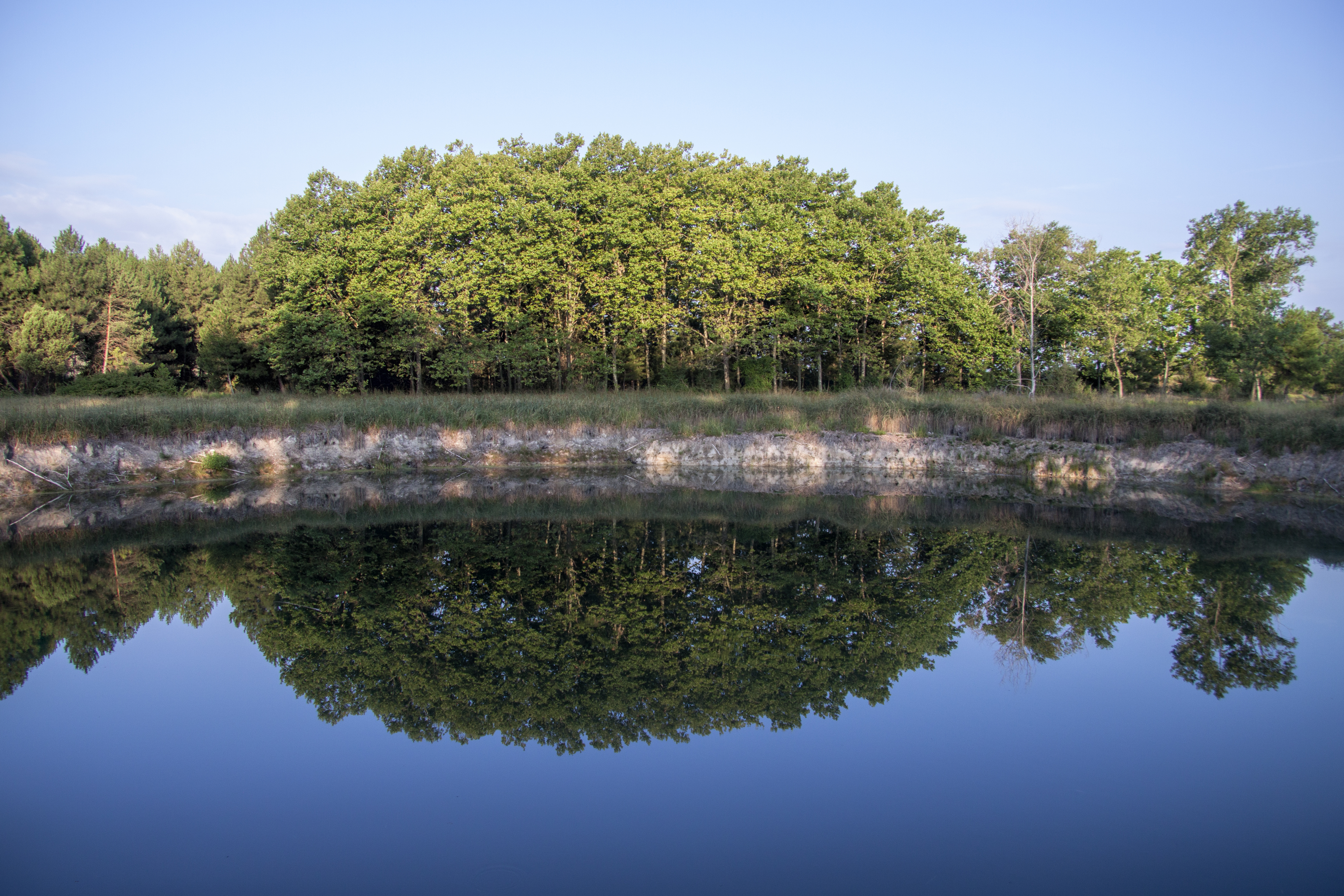 Estanys de Basturs This is a a photo of a natural area in Catalonia, Spain, with id: ES510110